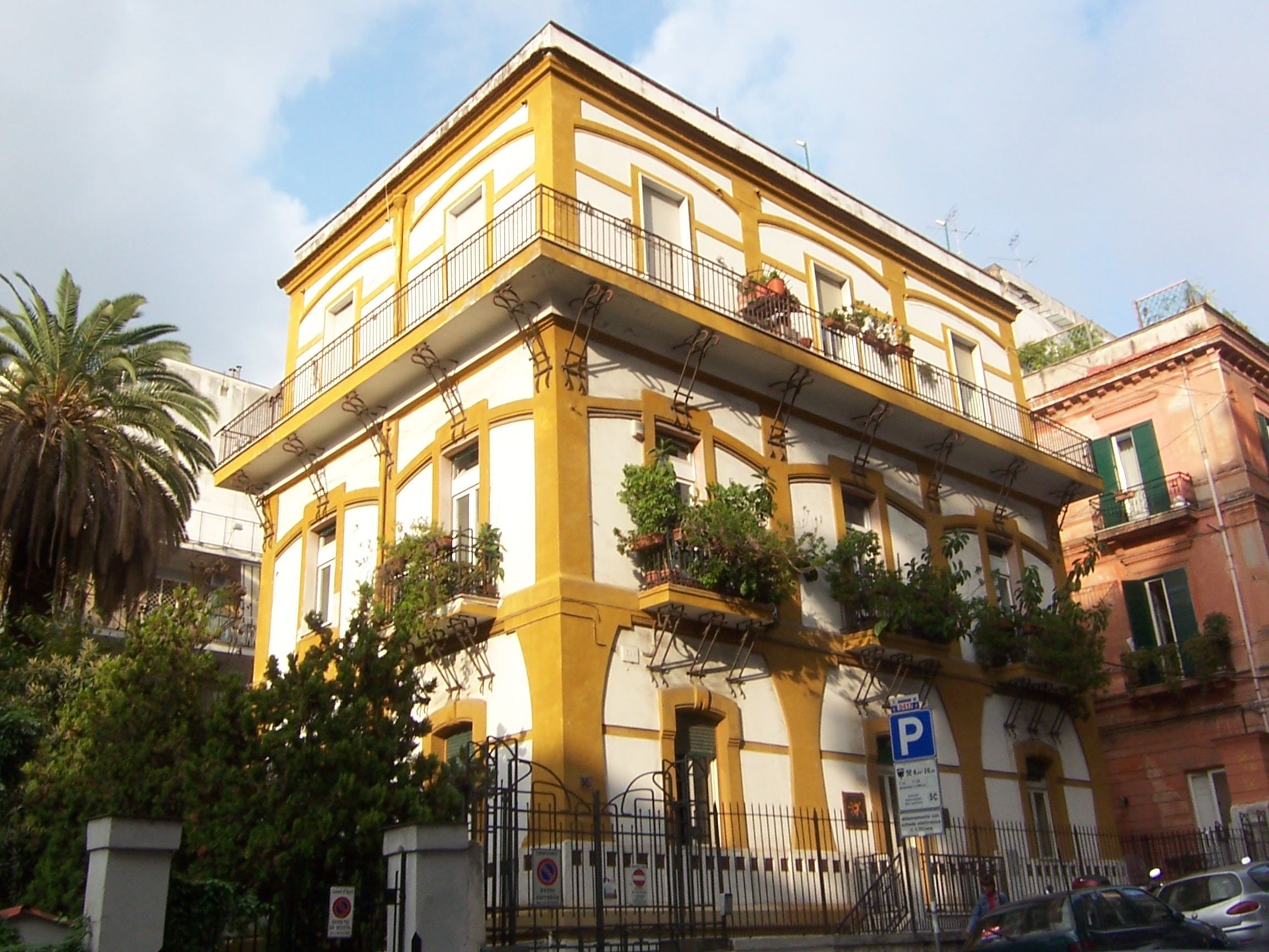 Casa Marotta, Vomero, Napoli